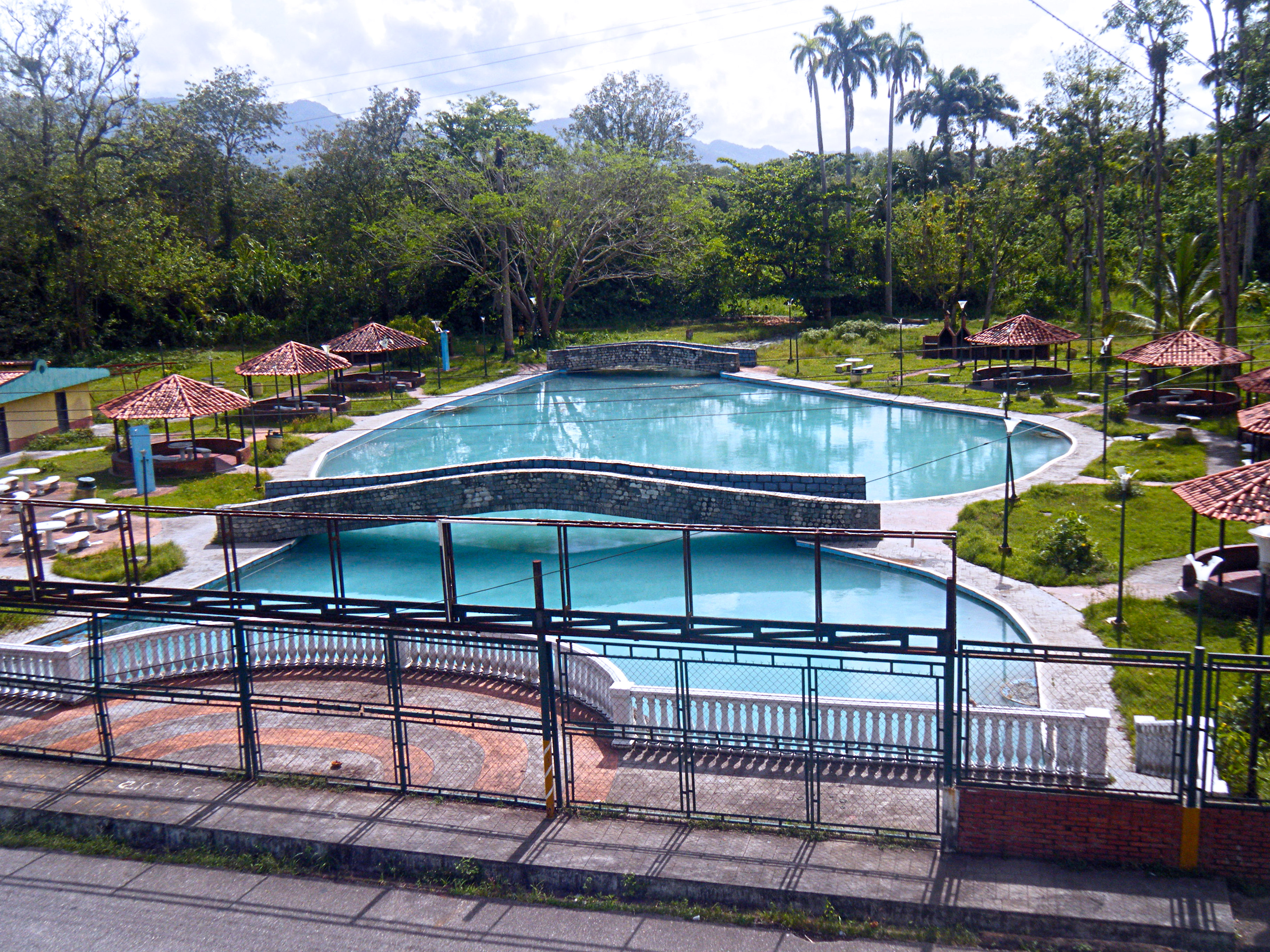 La Poza de Azufre, Caripito, Estado Monagas, Venezuela.